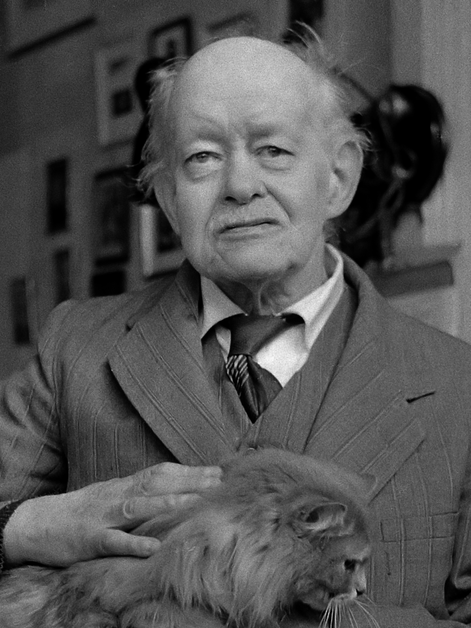 3 maart aanstaande hoopt de bekende Nederlandse kunstcriticus A. Cornelis Veth te Den Haag 80 jaar te worden 1 maart 1960